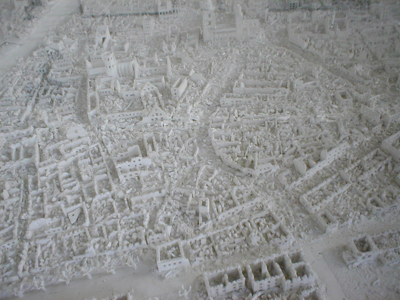 Modell der zerstörten Stadt Heilbronn nach dem Luftangriff vom 4. Dezember 1944; Entwurf und Ausführung Karl Schenkel und Fritz Bissinger